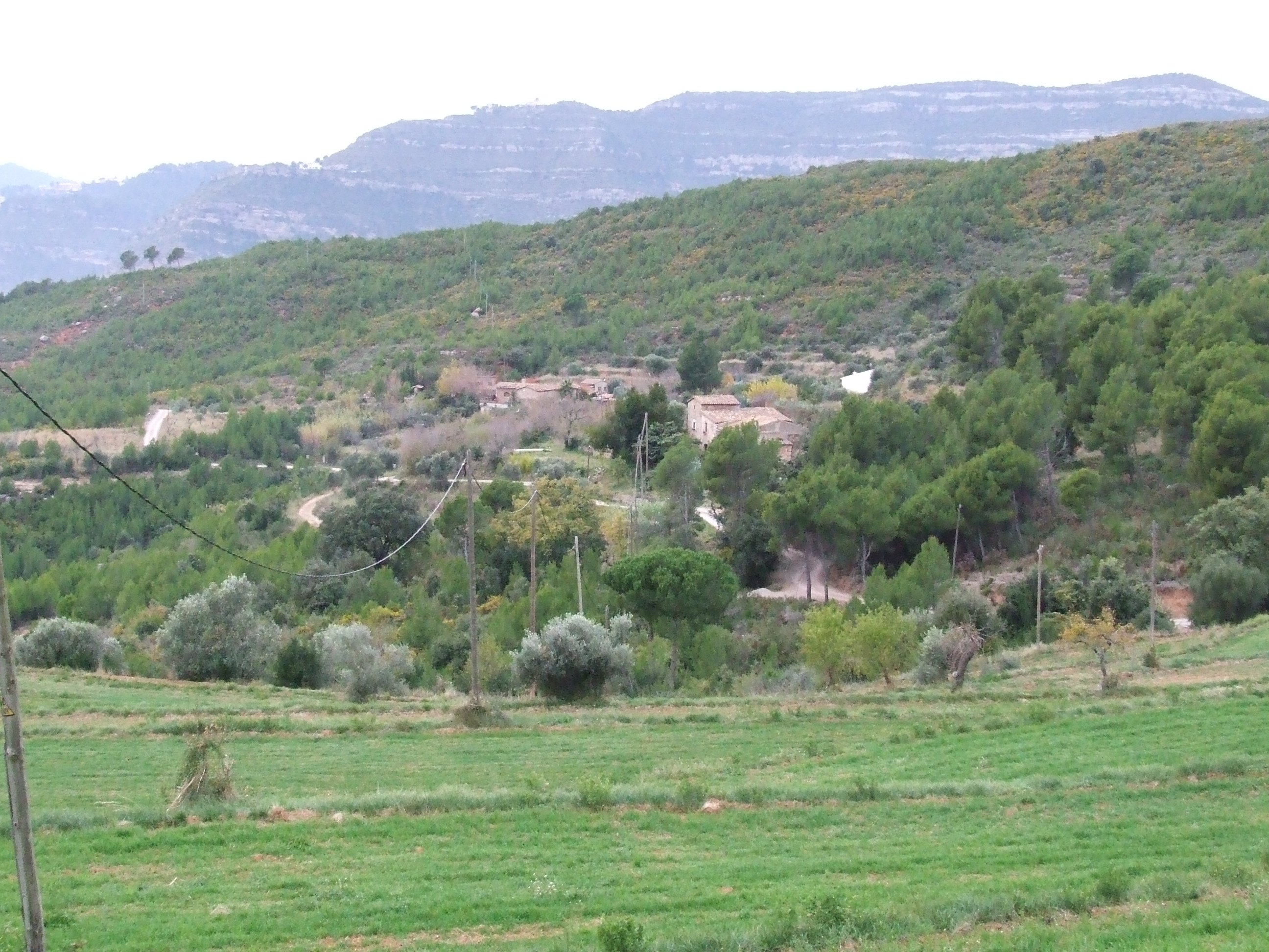 Veïnat de Can Quintanes (Riells del Fai, Bigues i Riells, Vallès Oriental)